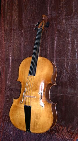 Violone built by Amit Tiefenbrunn ויולונה שנבנה על ידי עמית טיפנברון